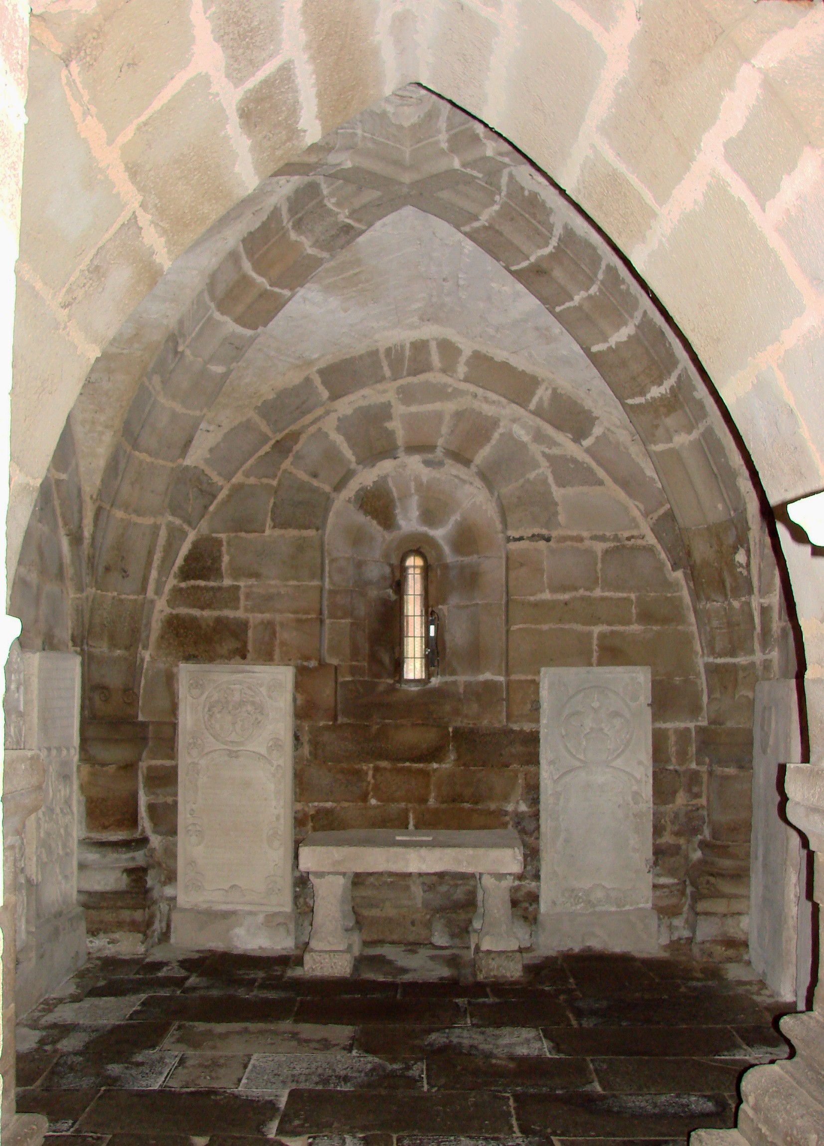 Stiftskirche Oberstenfeld, Gothic Crypt